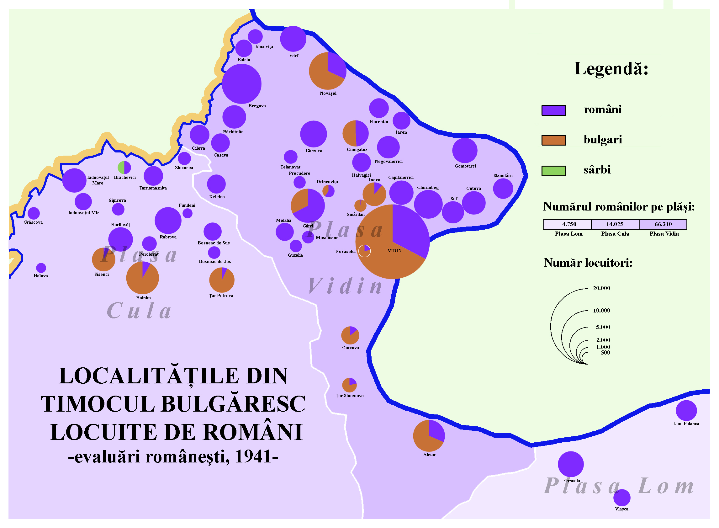 Harta localităţilor din Timocul bulgaresc în care locuiesc români, după evaluări româneşti din 1941